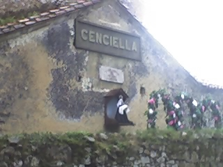 Foto tomada durante el rodaje de Luz de domingo